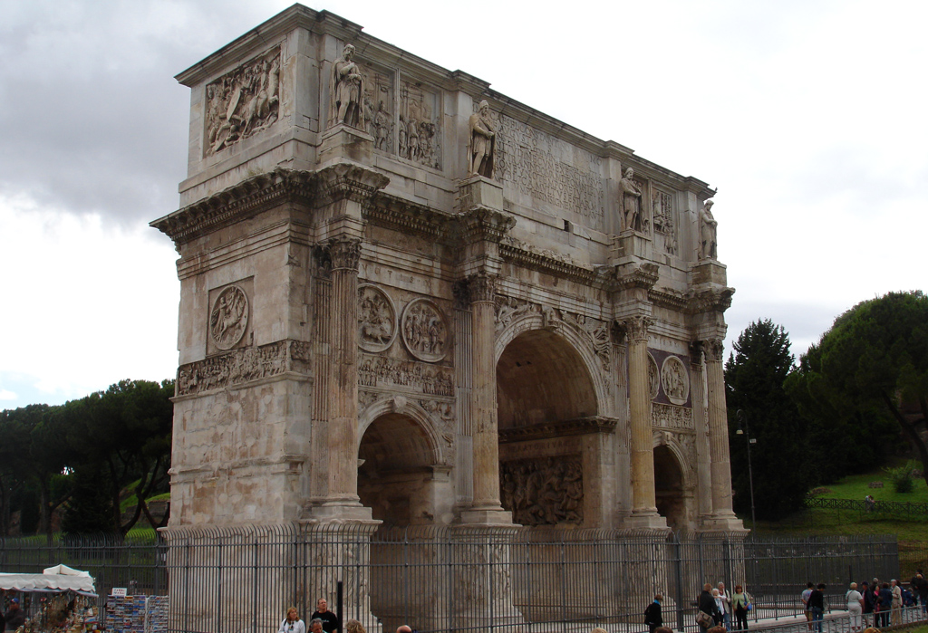 Arco di Costantino